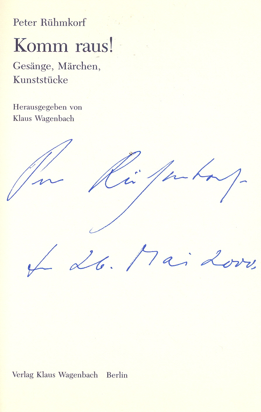 Autogramm von Peter Rühmkorf